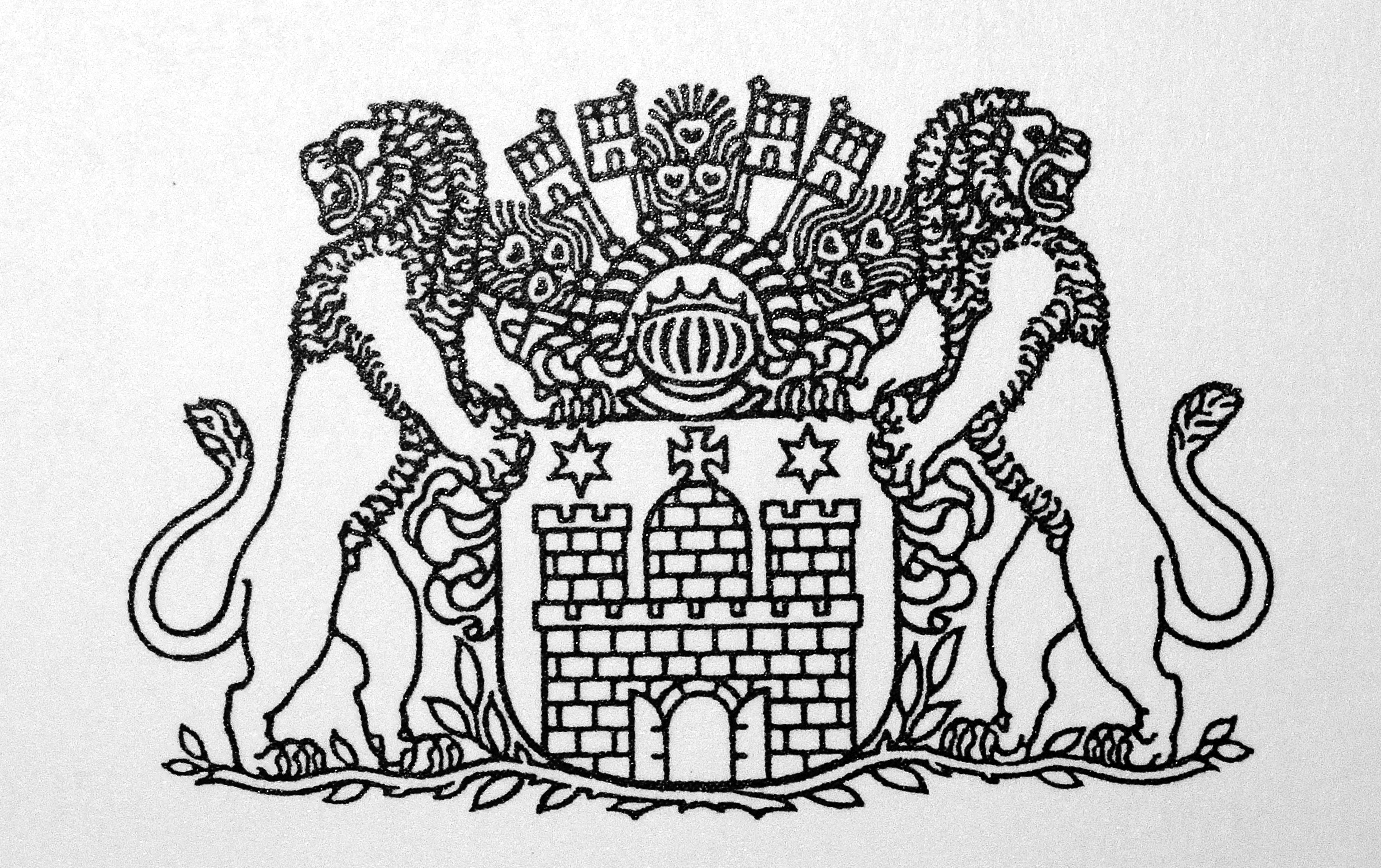 Hamburg-Wappen von 1946 für die neue Wochenzeitschrift DIE ZEIT von C.O.Czeschka - Aus dem Ausstellungskatalog der Handelskammer Hamburg von 2011